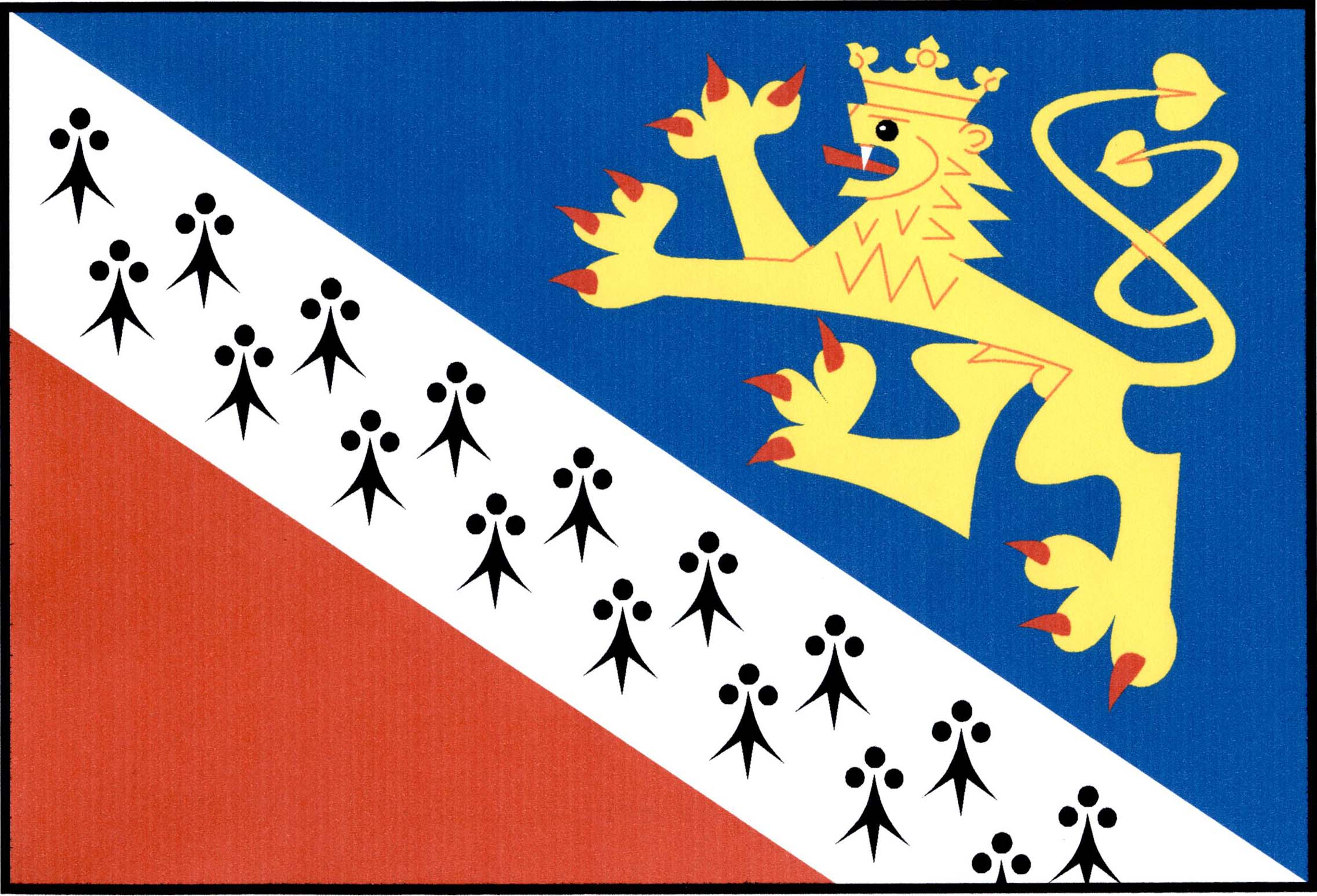 Vlajka obce Plužná